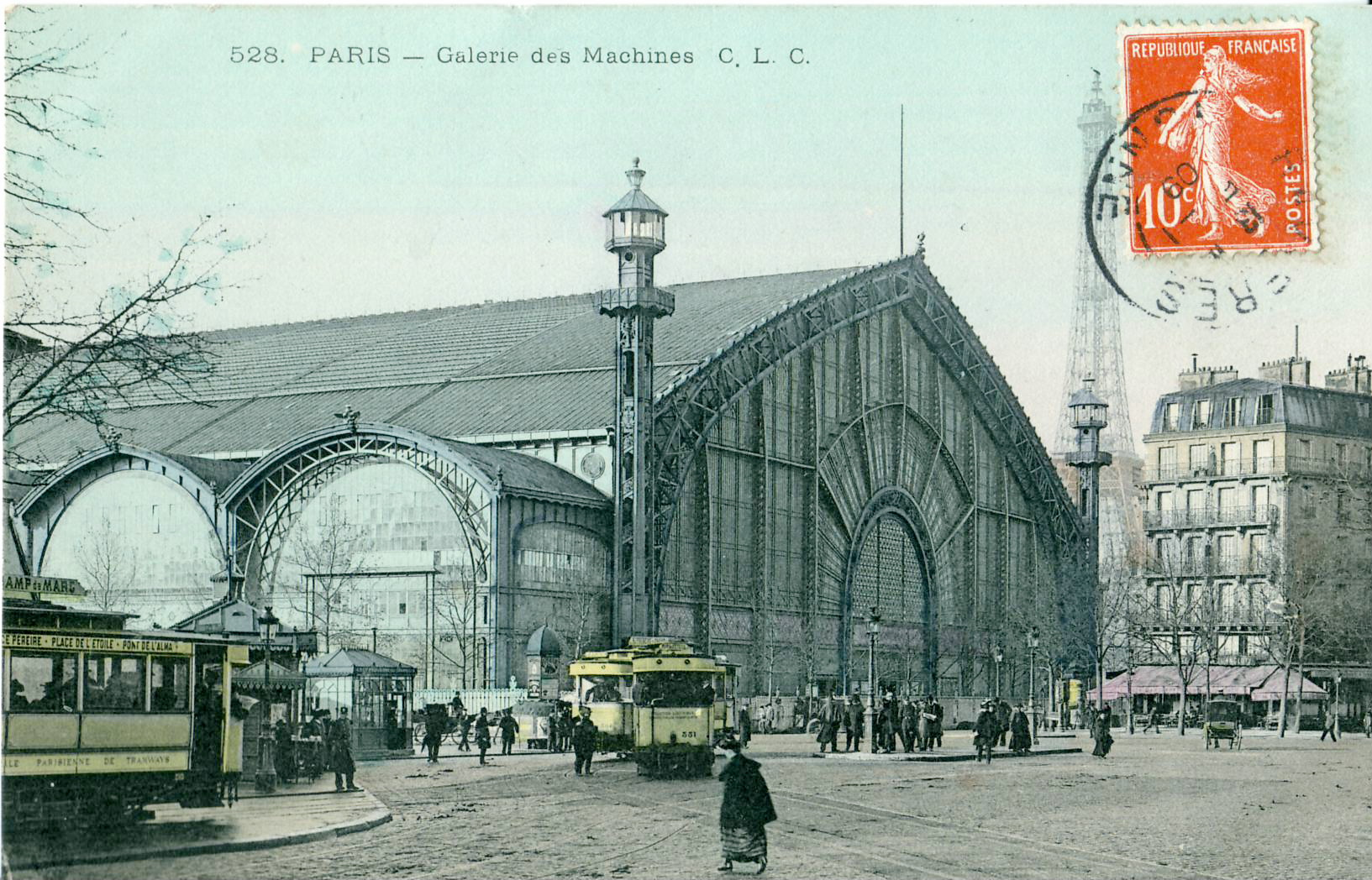 Carte postale ancienne éditée par CLC N°528PARIS : La Galerie des Machines.Au premier plan, tramways. Au loin, la Tour Eiffel. La Galerie des Machines a été construite pour l'Exposition universelle de Paris de 1889 par Charles-Louis Ferdinand Dutert, et démolie en 1909